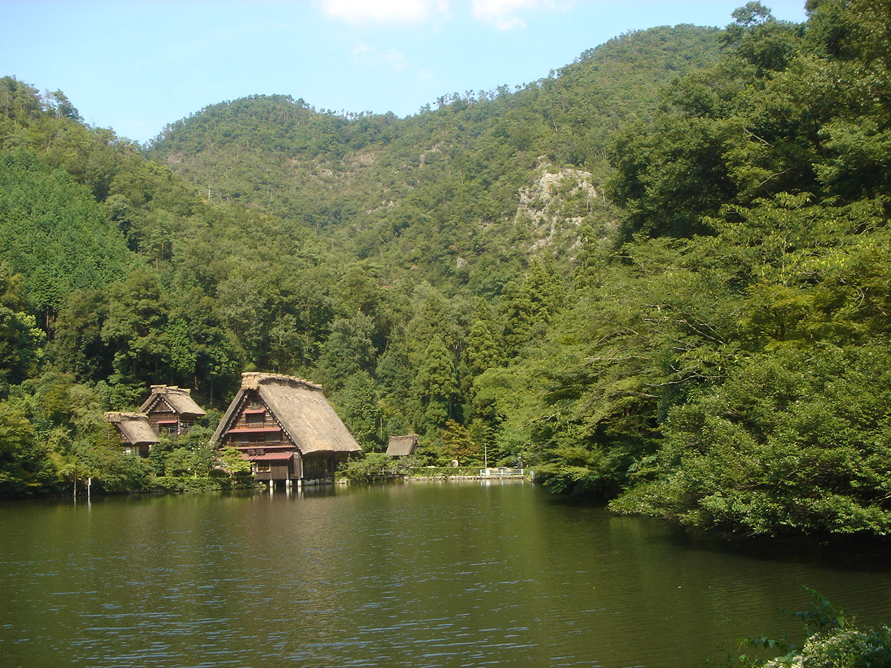 Matsuo-ike(Pond) in Gifu(松尾池),Gifu,Gifu,Japan(岐阜県岐阜市)で撮影